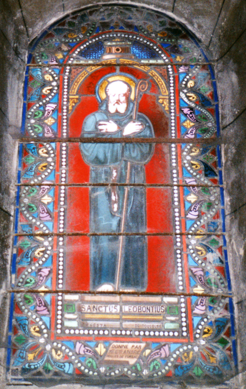 Vitrail de Saint Léobon dans l'église de Saint-Etienne-de-Fursac.